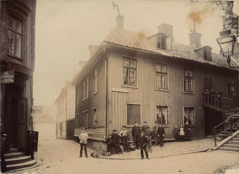 Nedre Kvarnbergsgatan 11, Wadmanska huset, Nordstaden i Göteborg. Bildsamlingen, Göteborgs stadsmuseum. Påskrift med bläck under fotografiet: "Nedre Qvarnbergsgatan åt söder, från hörnet af Spannmålsgatan. Till höger början af trapporna uppåt Qvarnberget, i midten hörnhuset af trä no (tomtnr. ) med den egendomliga trätrapp till andra våningen, i nedre våningen, rummet längst åt söder, lärer skalden Wadman bott."